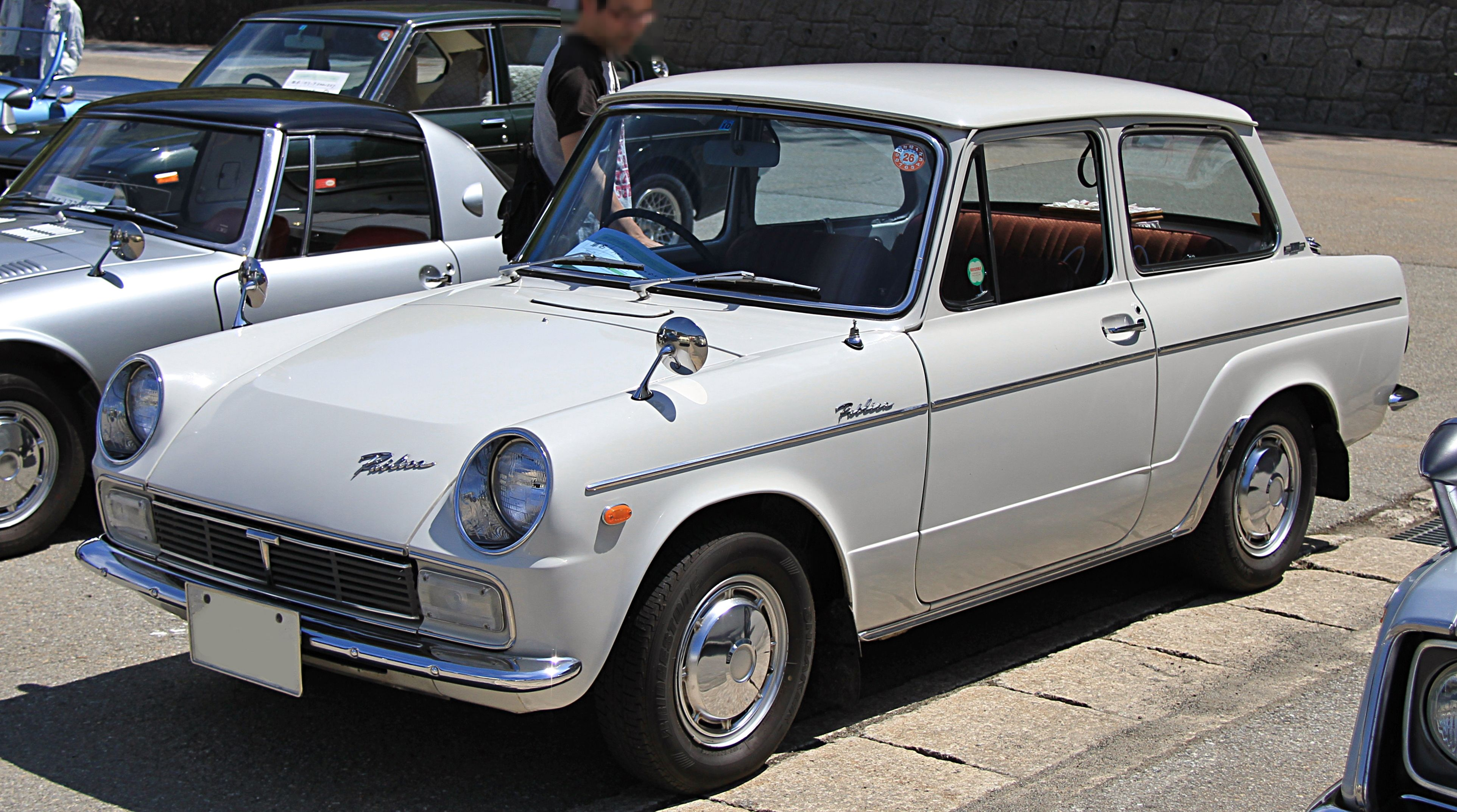 Toyota Publica UP20